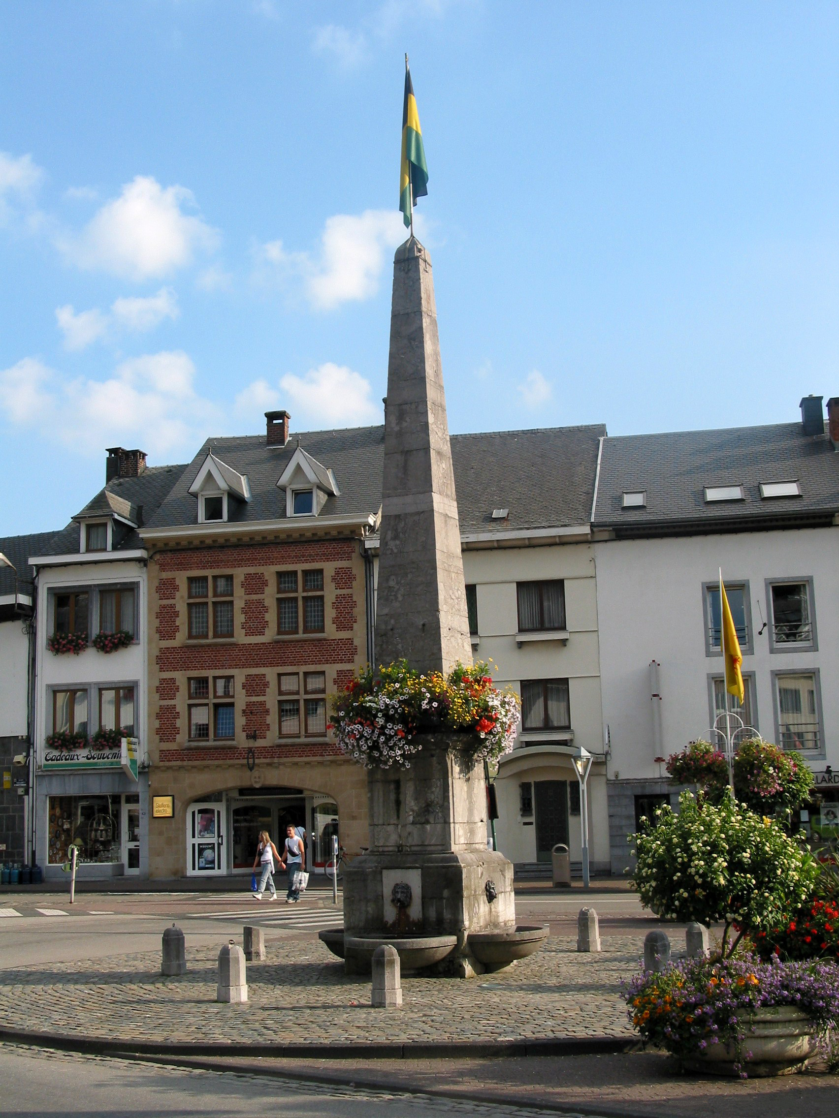 Malmedy (Belgique), la fontaine de la place Albert Premier.